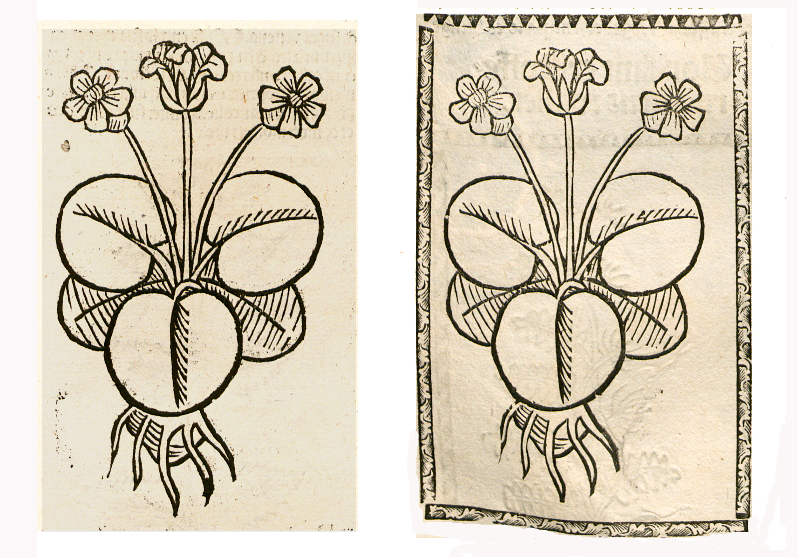 Abbildung vonː Se Blumen (Nuphar lutea)